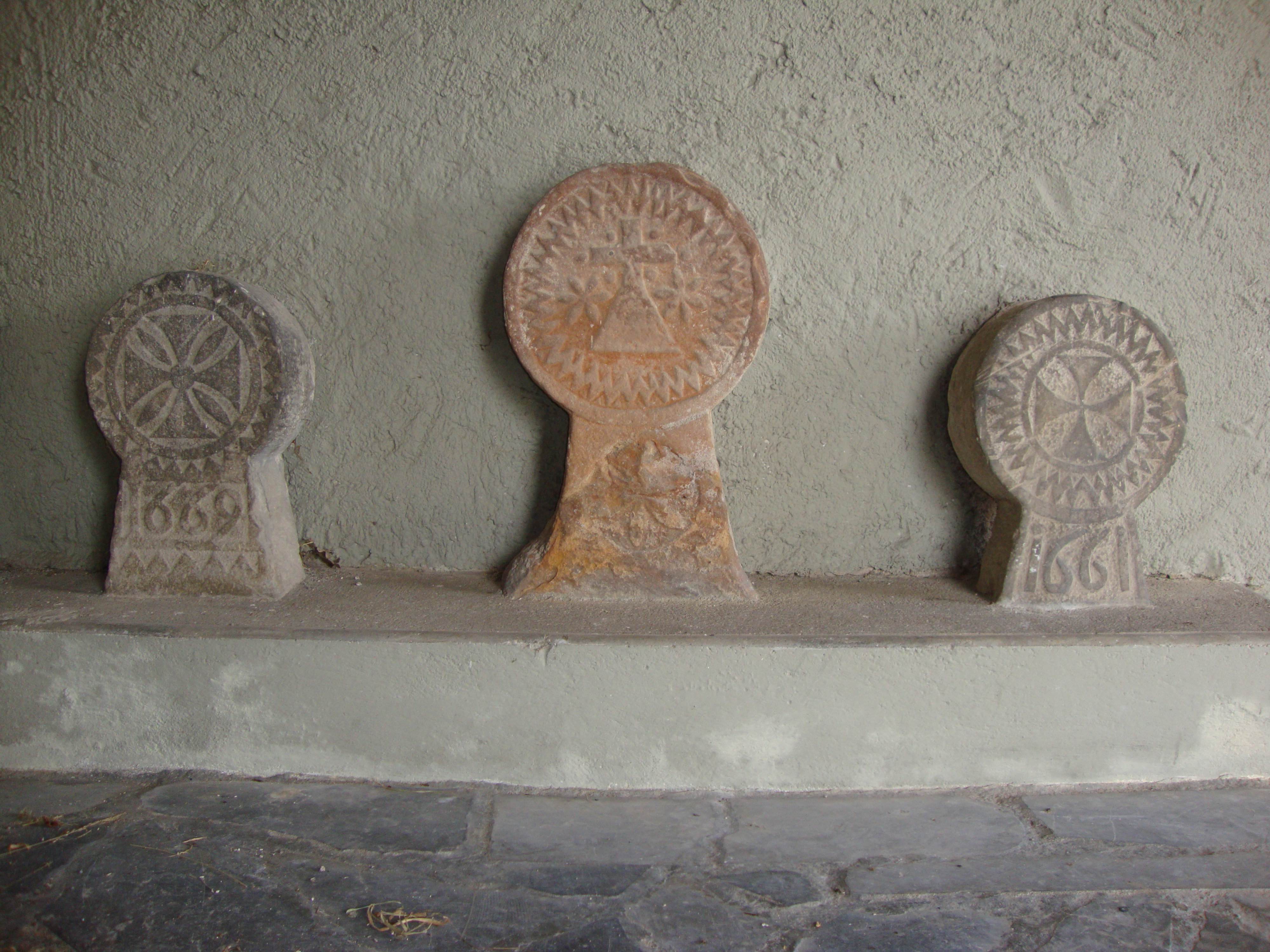 Espès (Espès-Undurein, Pyr-Atl, Fr) steles discoïdales anciennes sous le porche de l'église